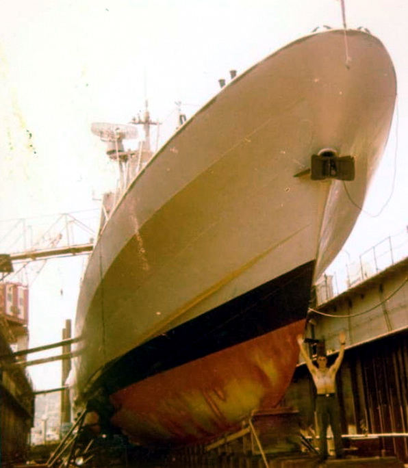 אח"י עליה במבדוק לקראת השקתה